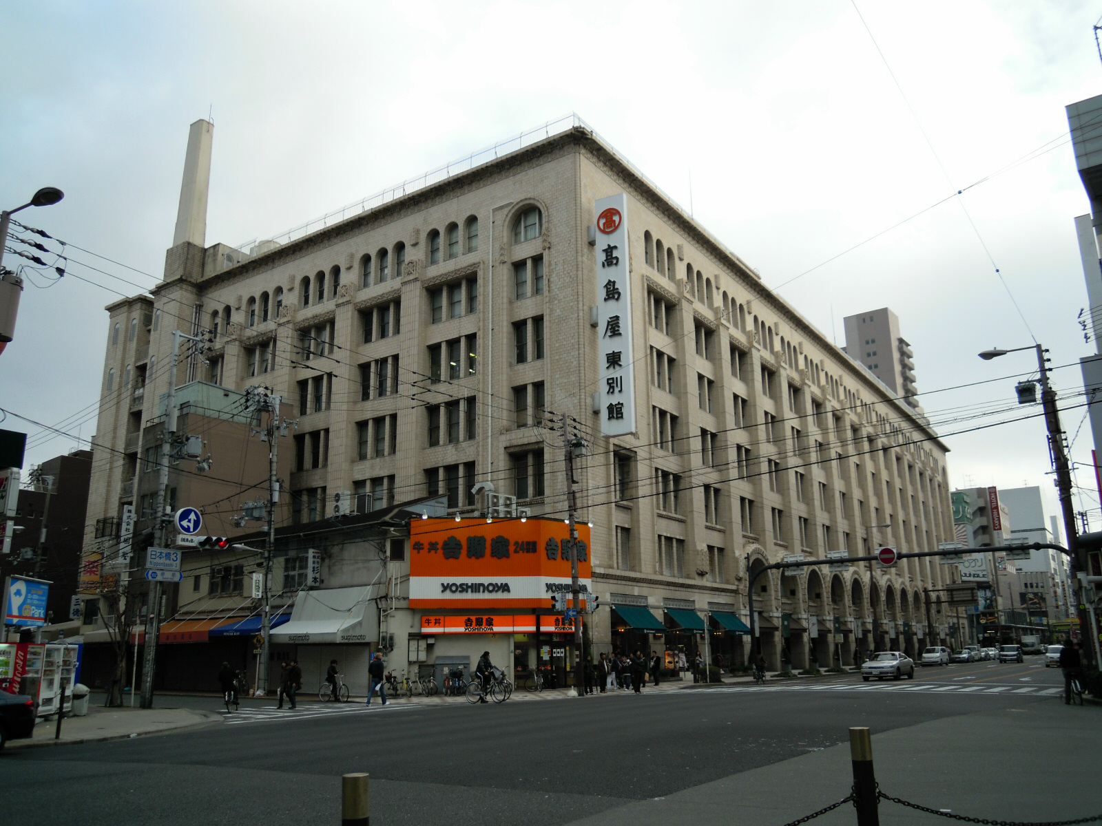 Takashimaya east annex